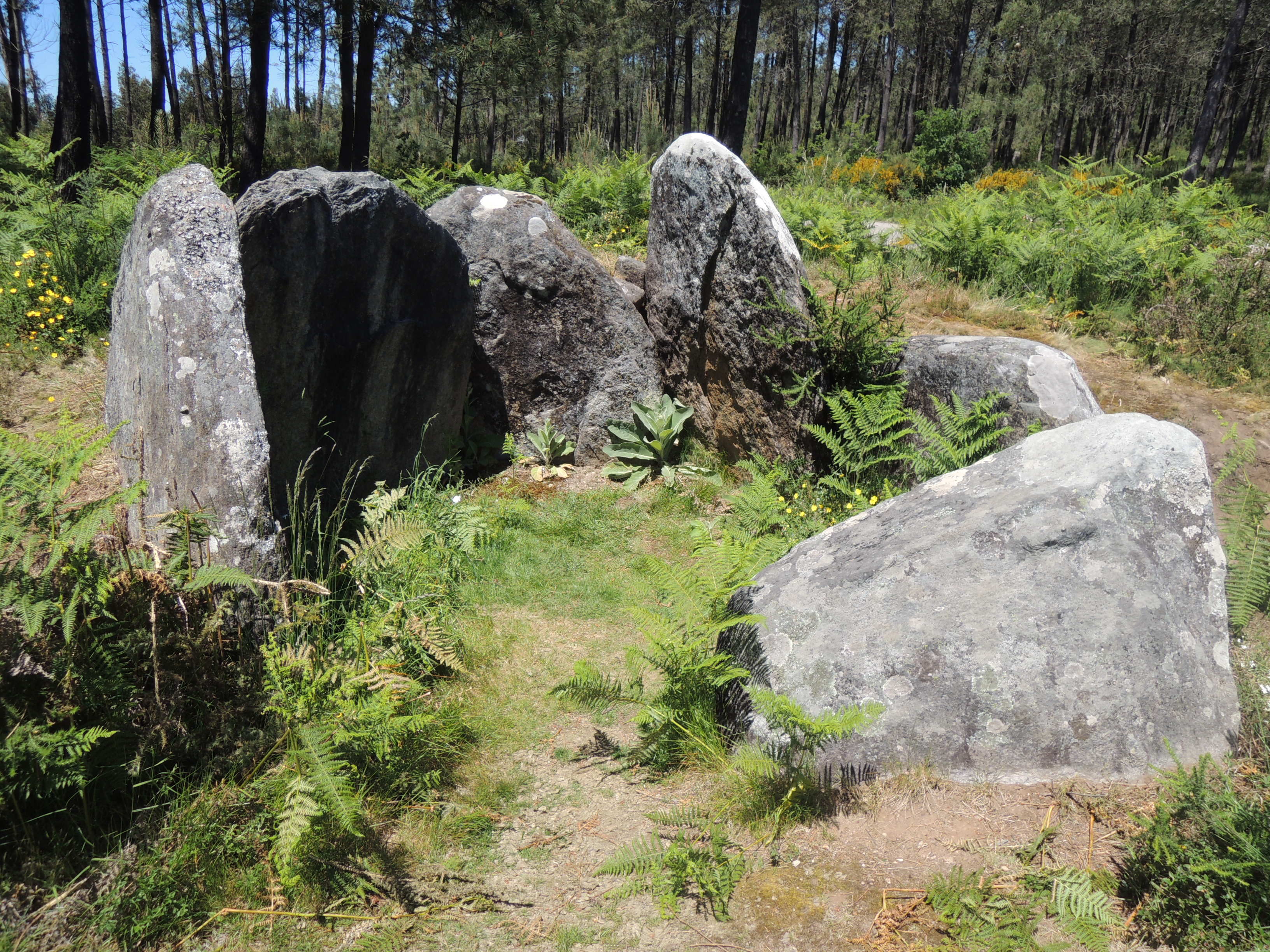 Mámoa do Rei. Este dolmen es uno de los elementos destacados del parque arqueológico de Monte Penide, Redondela.